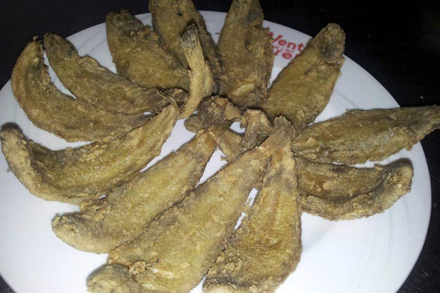 Acedias del trasmallo fritas. Foto realizada en Venta Aurelio. Restaurante en Chipiona. Cádiz